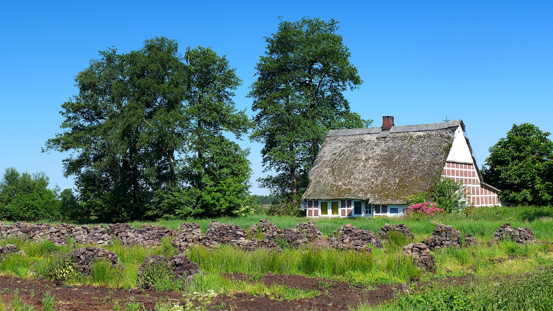 Reetgedecktes Bauernhaus am 3. Kanal von Wischhafen Neulandermoor. Auf den umgebenden Landflächen findet gegenwärtig Torfabbau statt. Aufnahmedatum 2015-06.